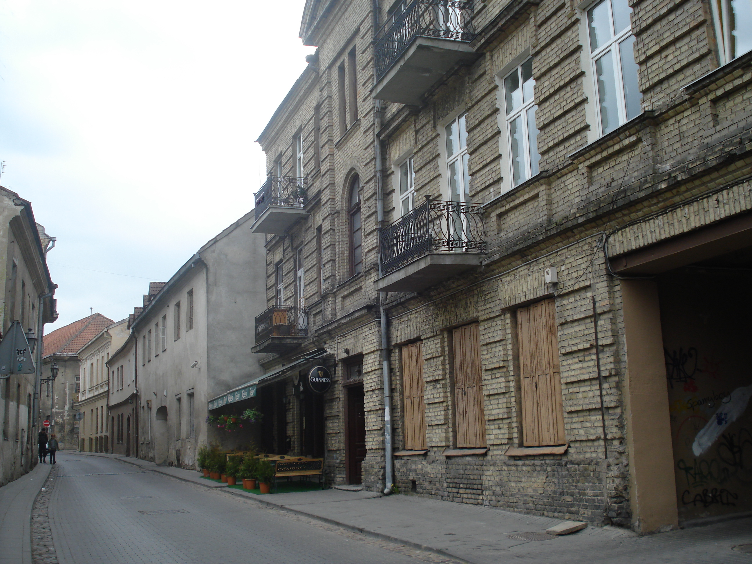 Bokšto gatvė (Bokshto street) in Vilnius